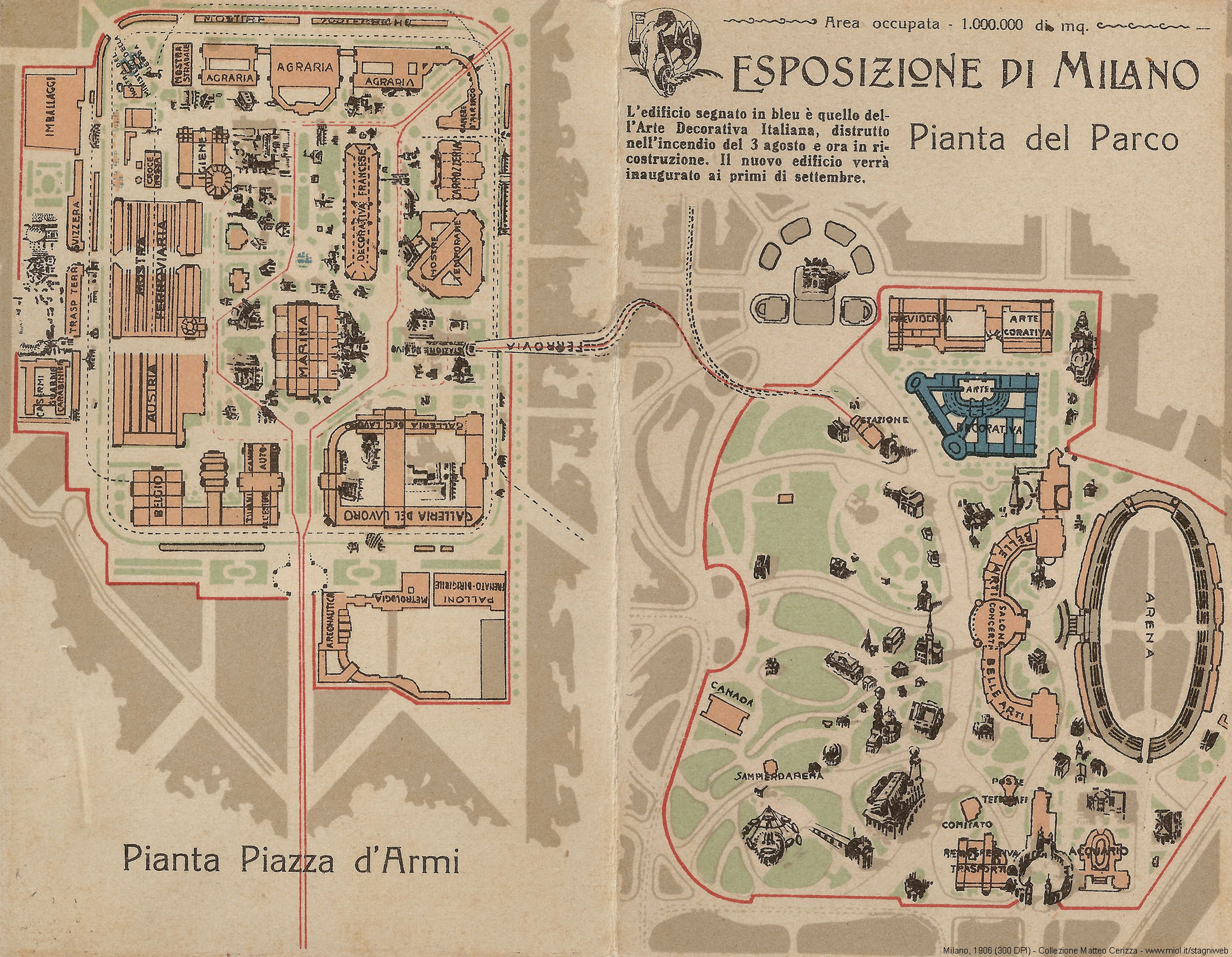 Mappa dell'Esposizione Internazionale di Milano o Esposizione internazionale del Sempione o Expo 1906 . A sinistra la parte che insisteva sulla Piazza d'Armi (in seguito area della Fiera Campionaria, oggi area residenziale); a destra la parte che occupava il Parco Sempione. Le due aree erano collegate dalla Ferrovia sopraelevata visibile nel centro della mappa.